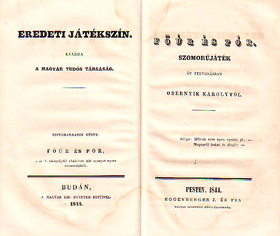 Obernyik Károly: Főúr és pór - Szomorújáték öt felvonásban 1844-es kiadás címoldala